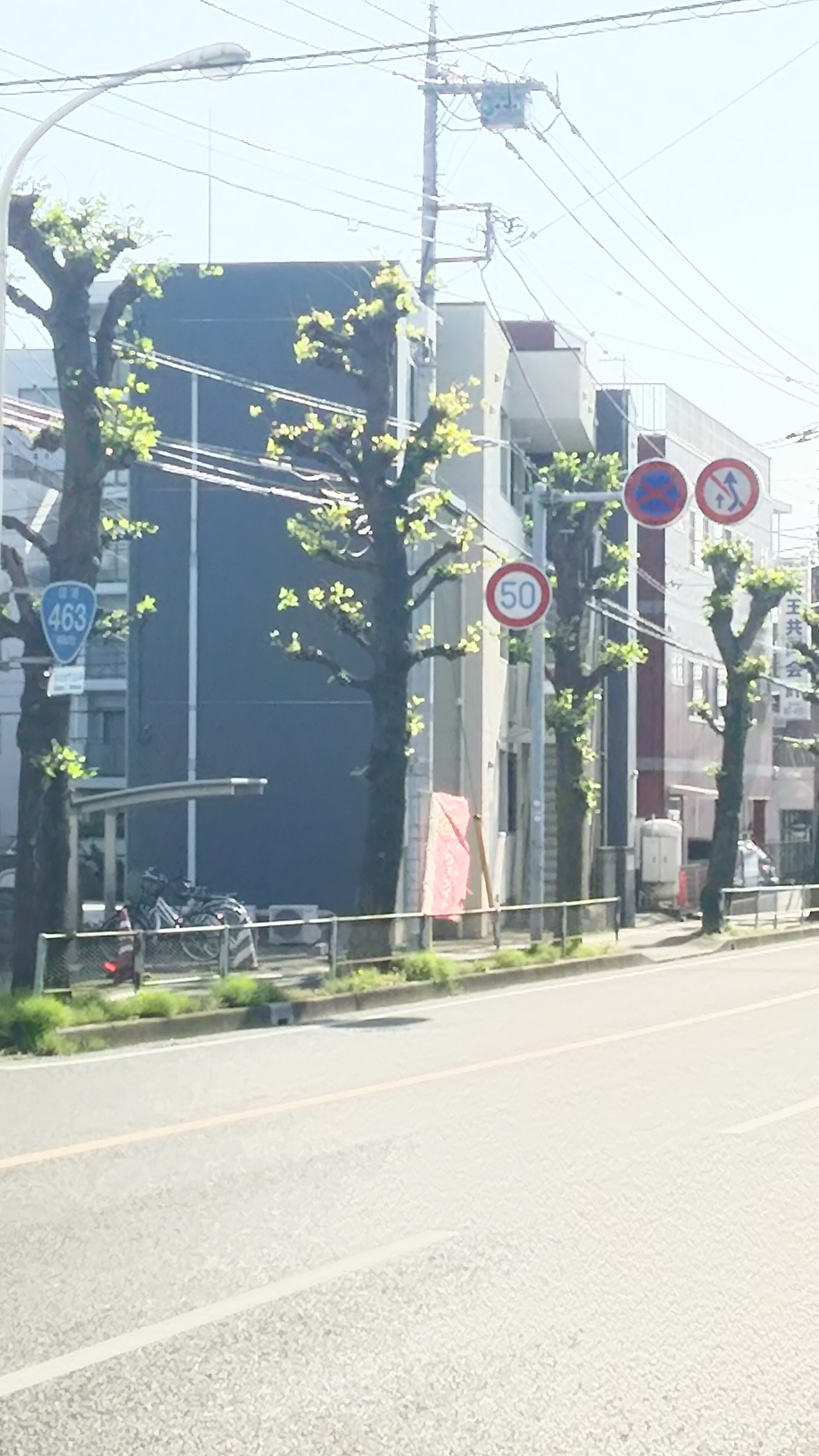 国道463号 さいたま市桜区山久保